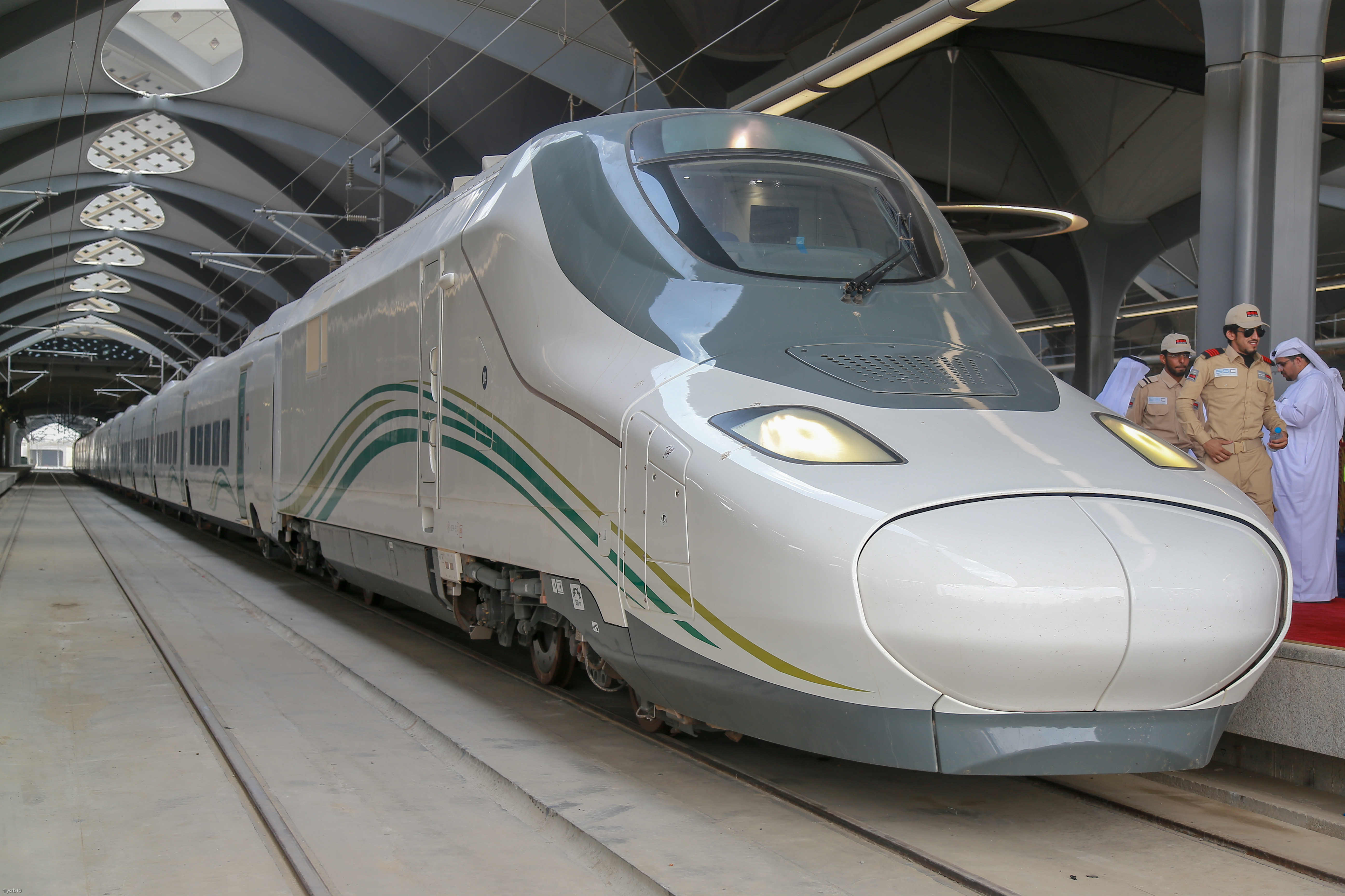 صورة لقطار الحرمين